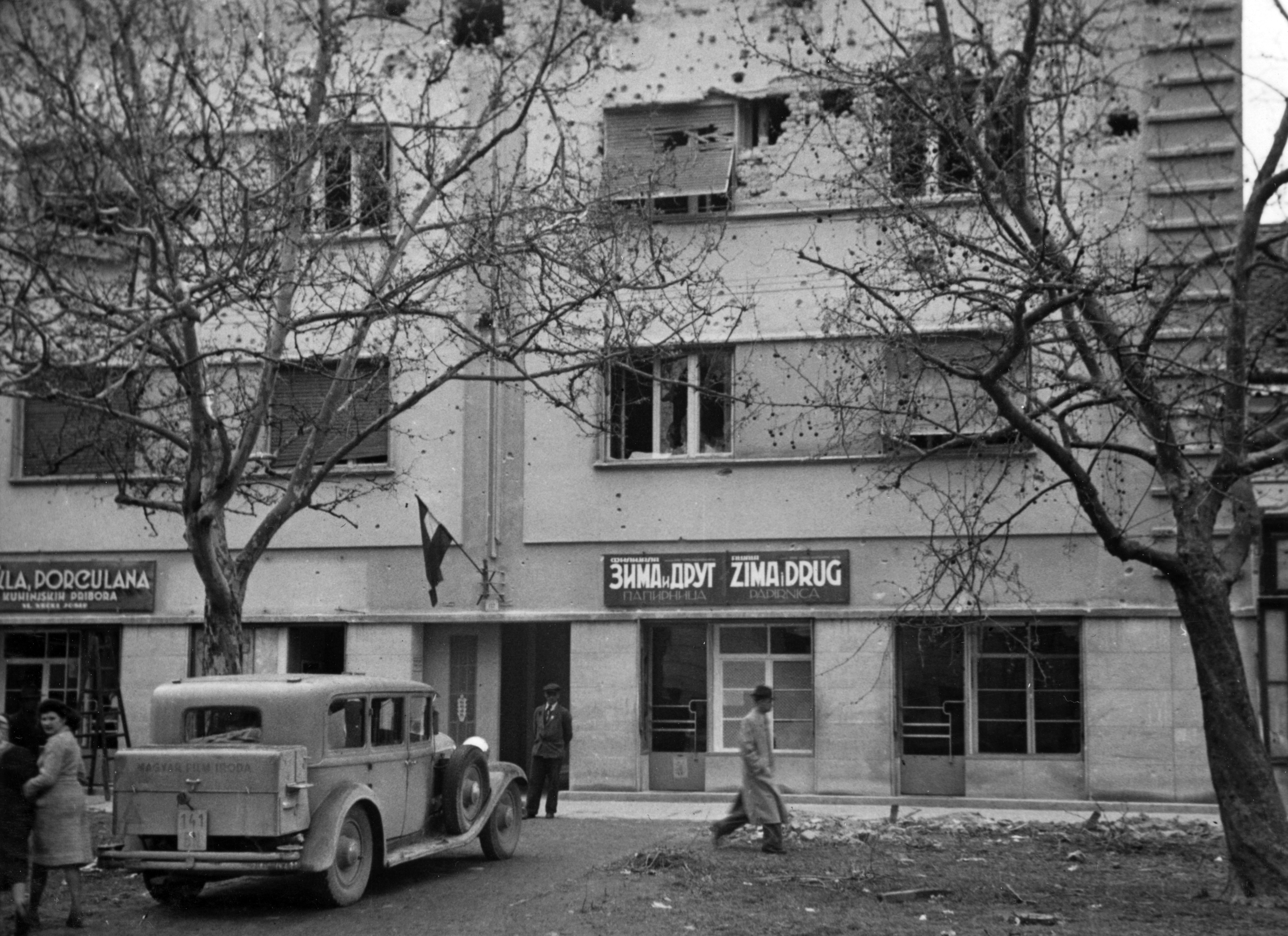 a Magyar Film Iroda NAG gyártmányú személygépkocsija. Location: Serbia, Novi Sad Title: a Magyar Film Iroda NAG gyártmányú személygépkocsija.